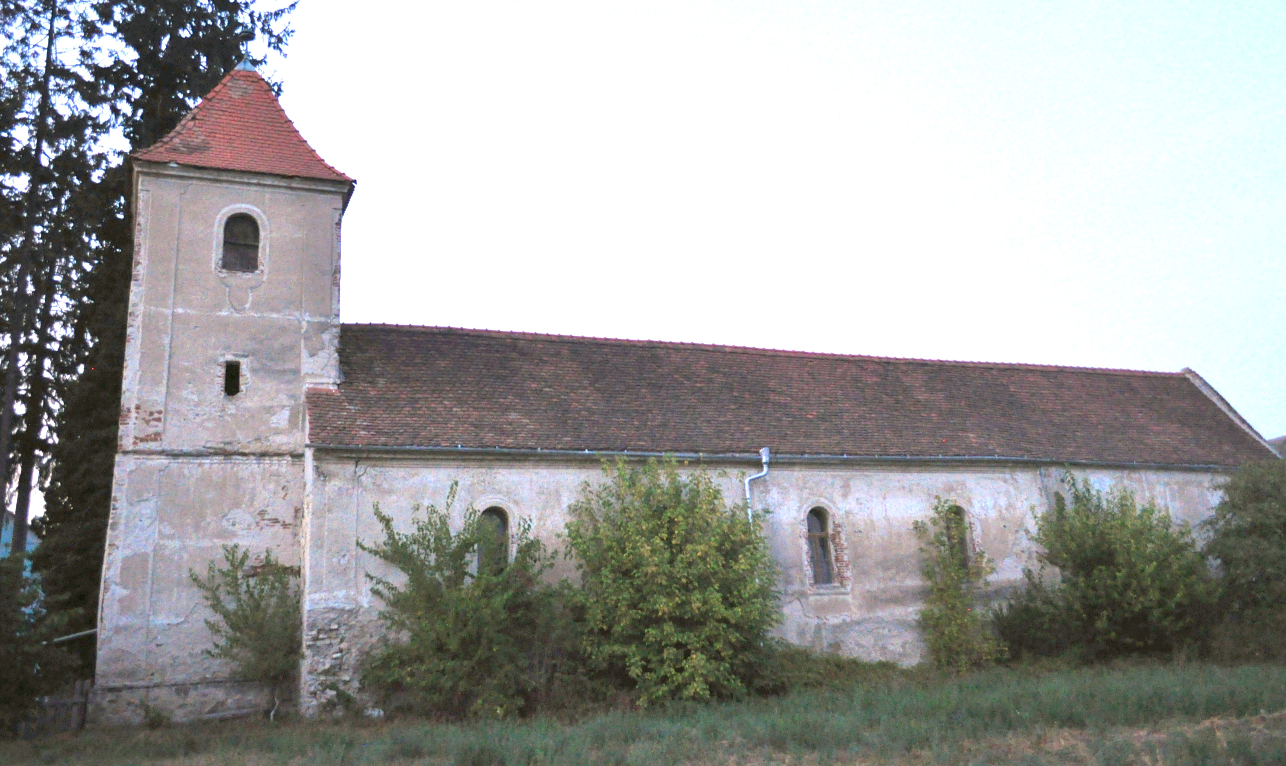 Biserica evanghelică din Pianu de Jos, județul Alba 01